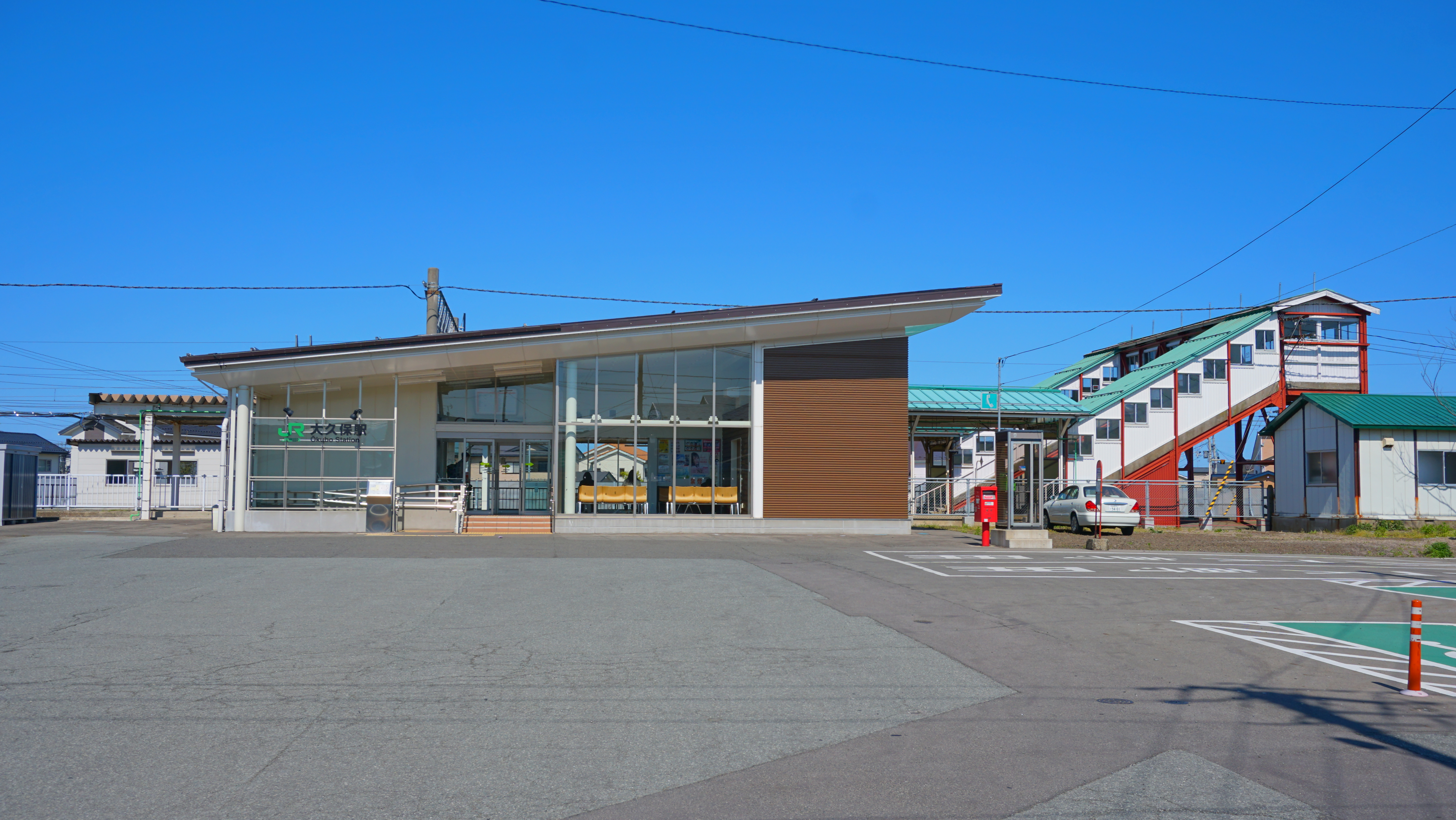 奥羽本線 大久保駅